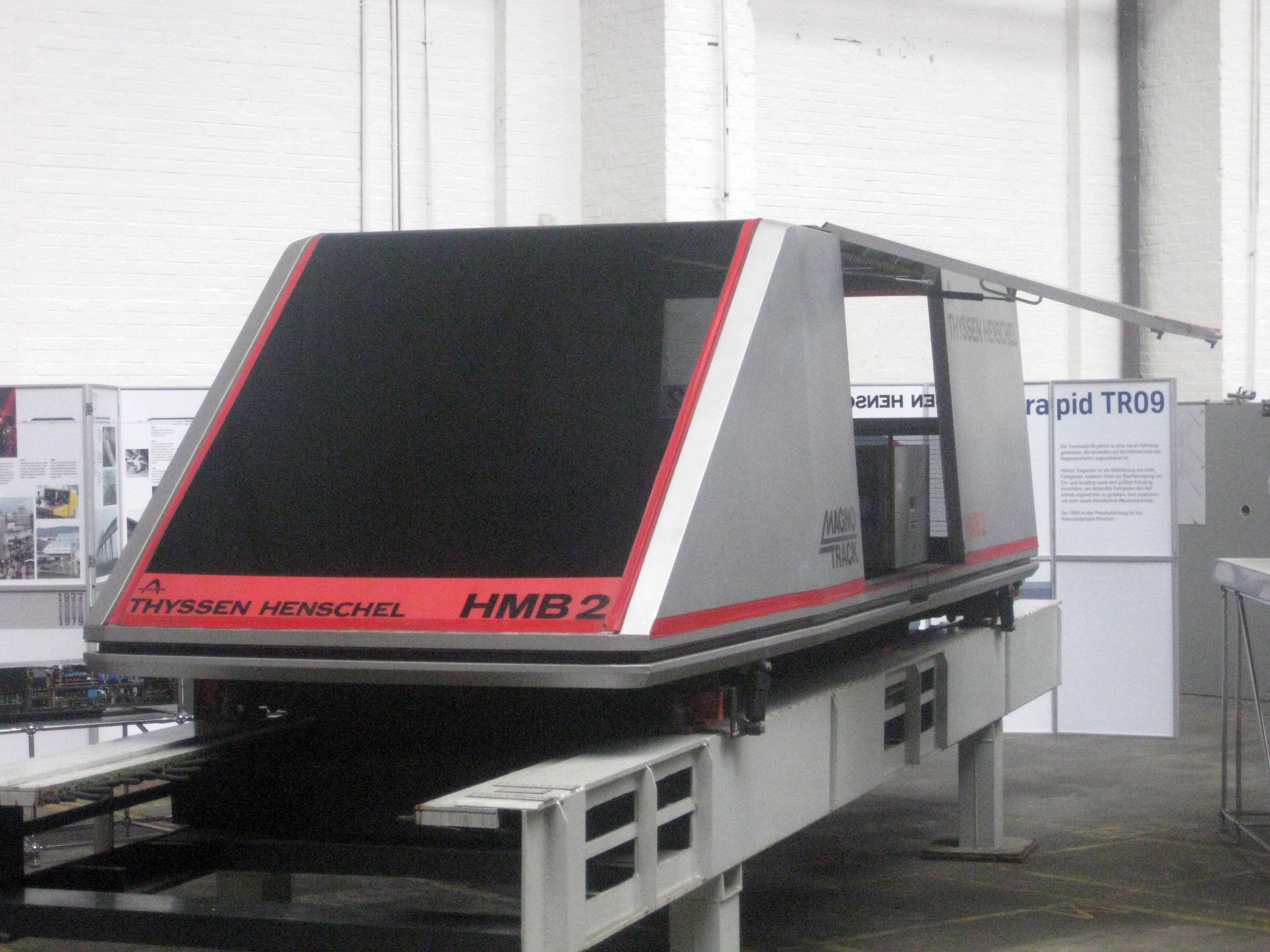 Der Transrapid-Vorläufer HMB 2 von Henschel, ausgestellt im Technikmuseum Kassel